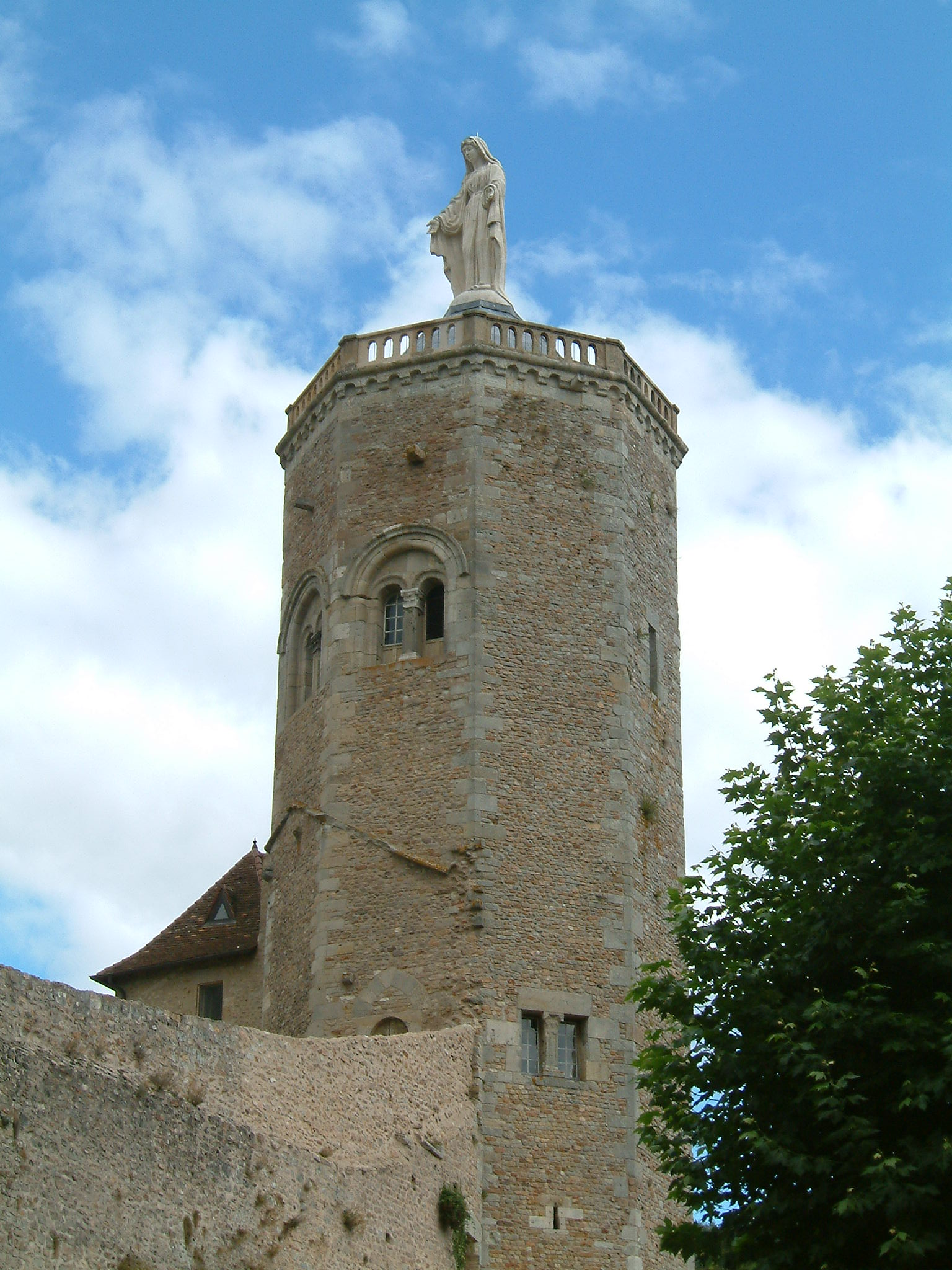 Tour des Ursulines, Autun, Bourgogne, FRANCE